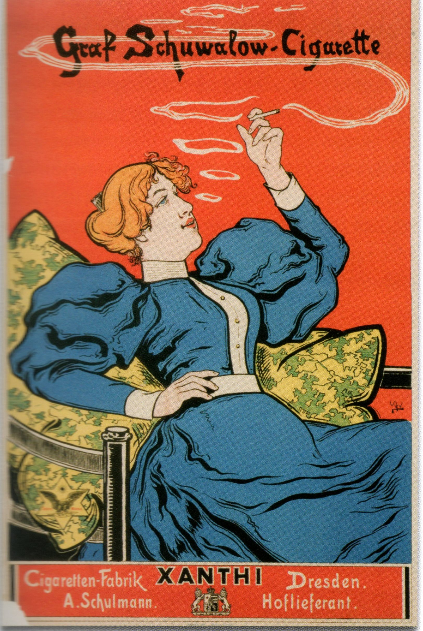 Werbeplakat für die Zigarettenmarke Graf Schuwalow